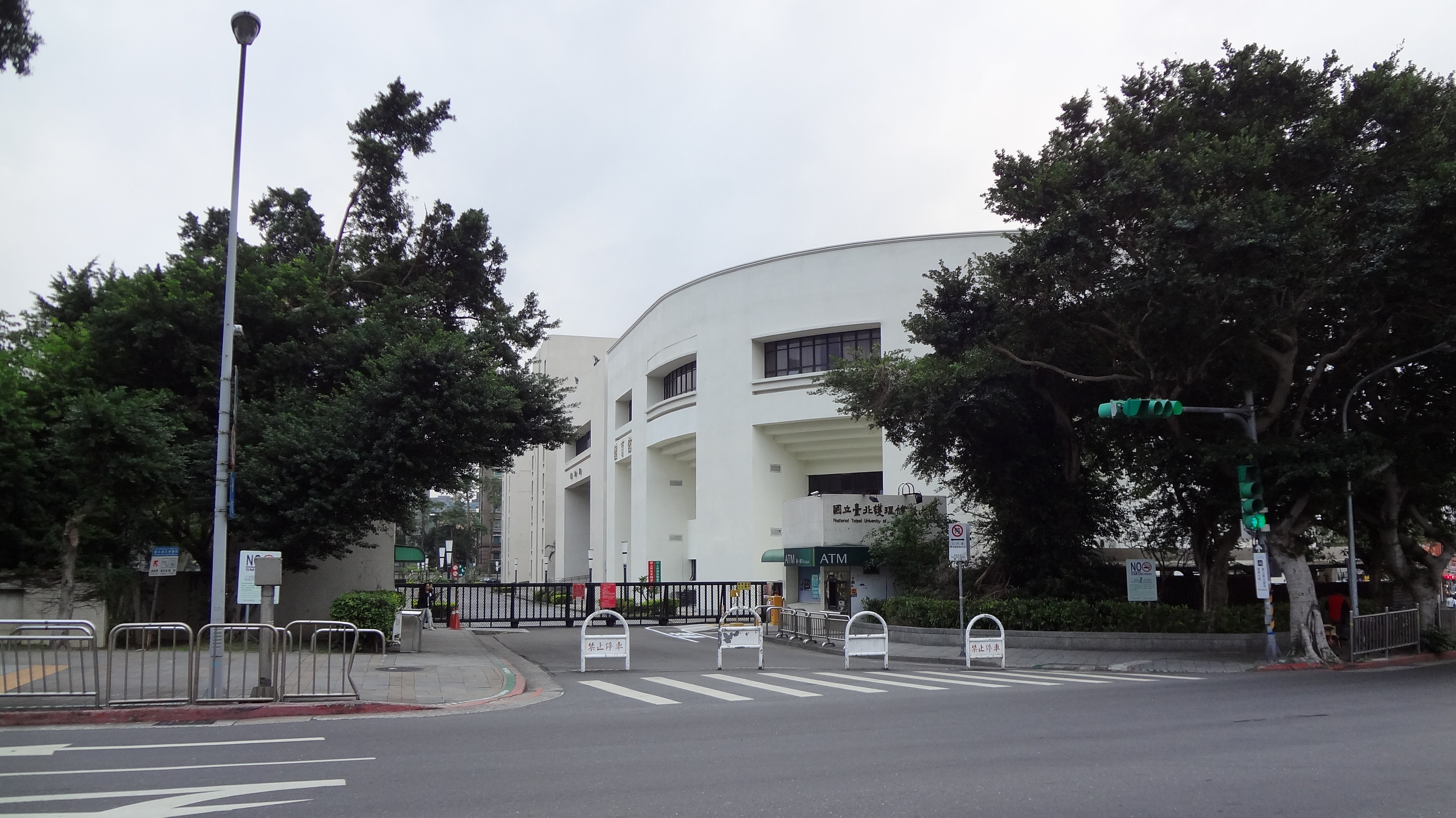 中文（台灣）: 國立臺北護理健康大學，位於臺北市北投區明德路365號。